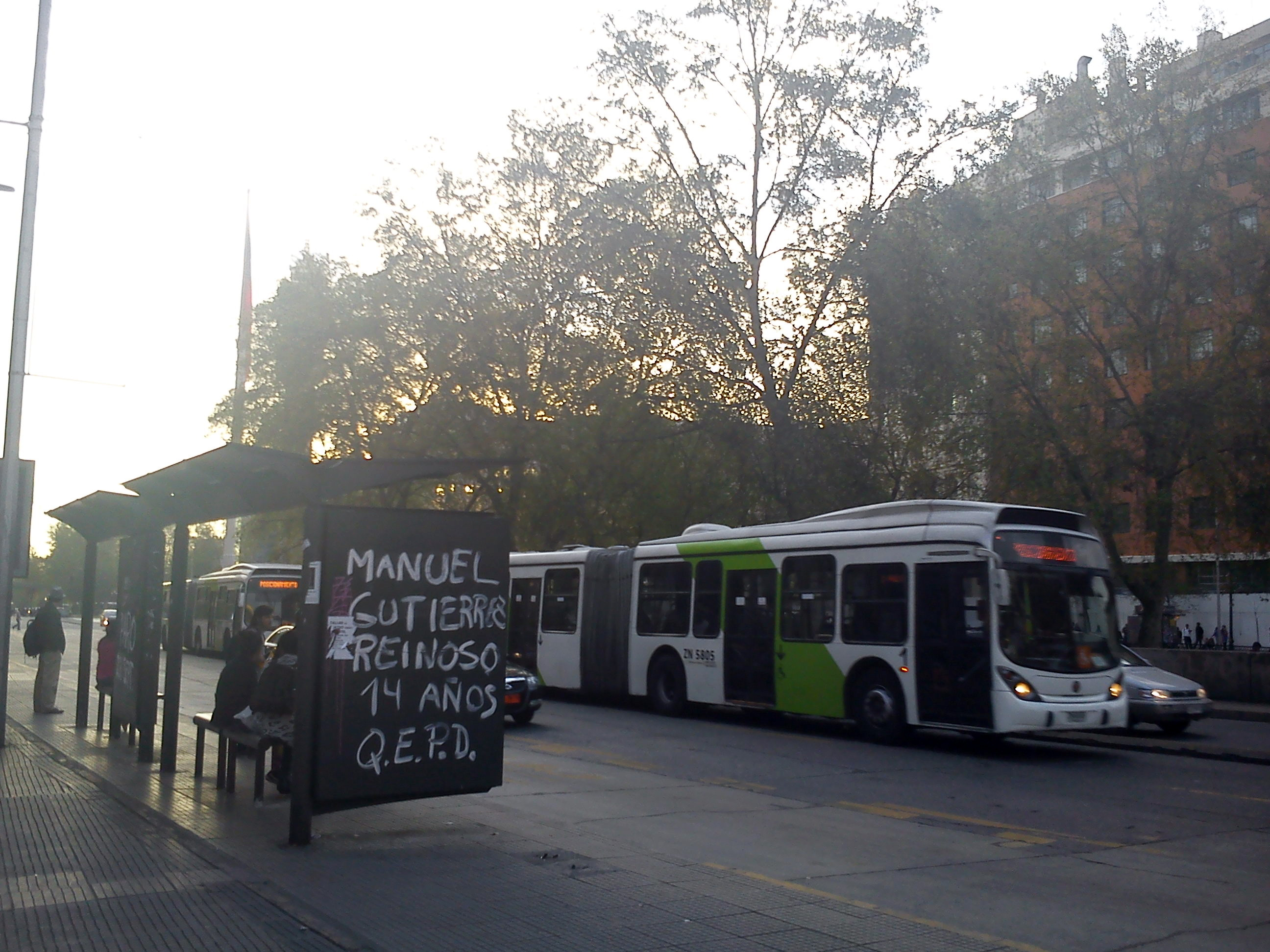 Grafiti en un paradero de microbuses en la Alameda (Santiago de Chile) en recuerdo del estudiante Manuel Gutiérrez, asesinado por Carabineros de Chile.